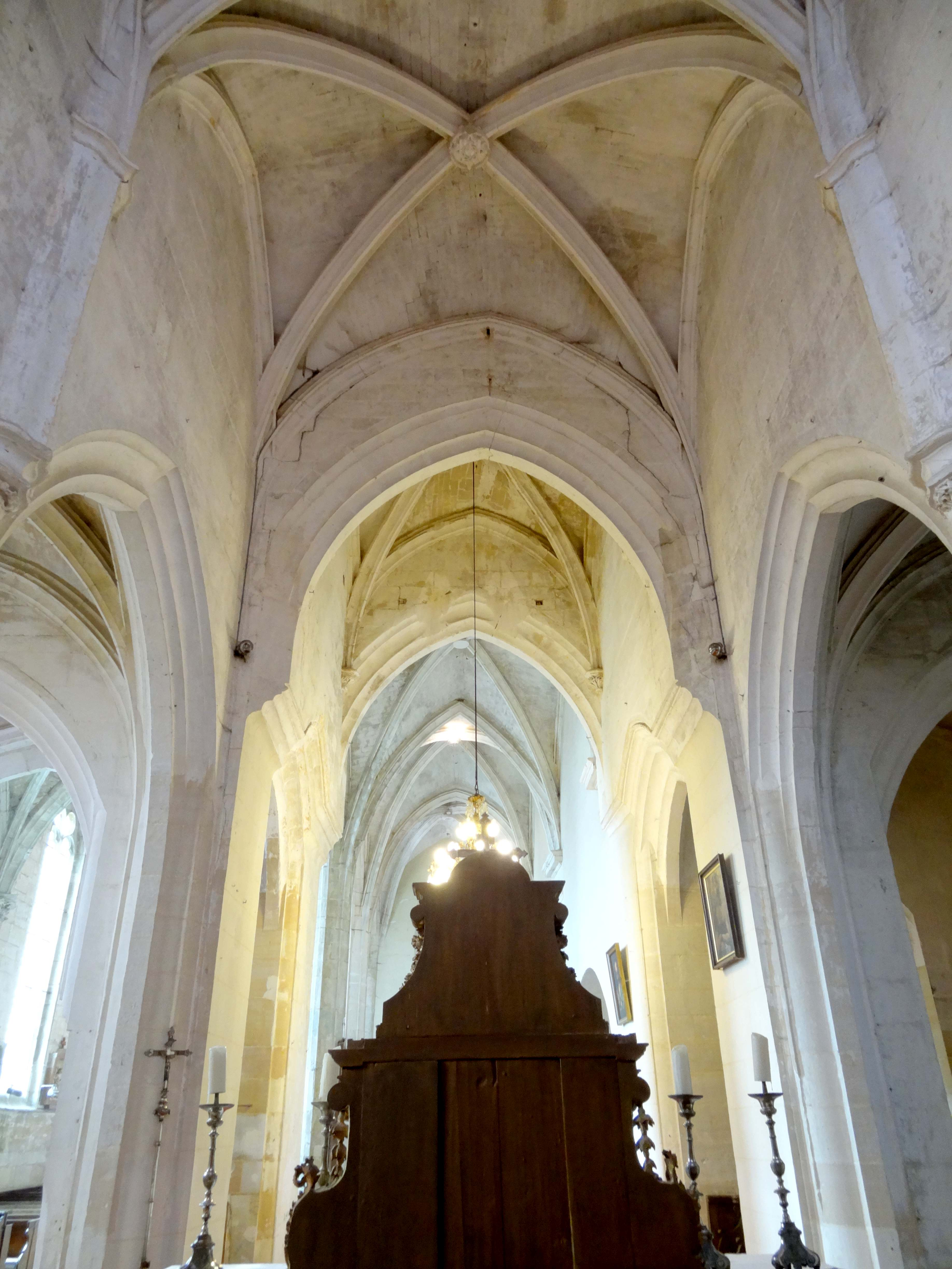 Intérieur de l'église - voir titre.